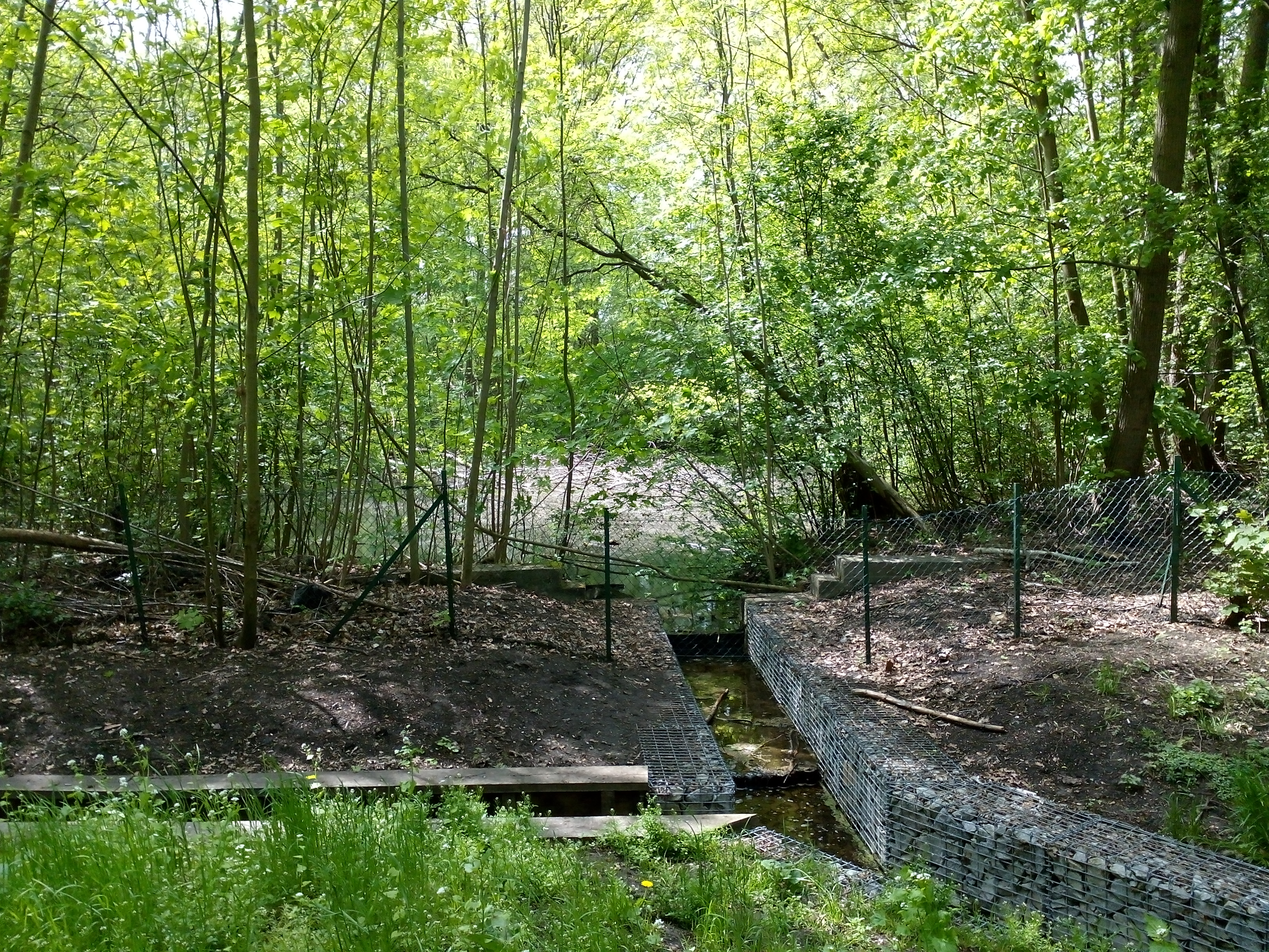 Ziegeleigraben am Albtalweg, Naturschutzgebiet in Berlin-Reinickendorf